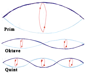 Ryhtmischer Magnetismus